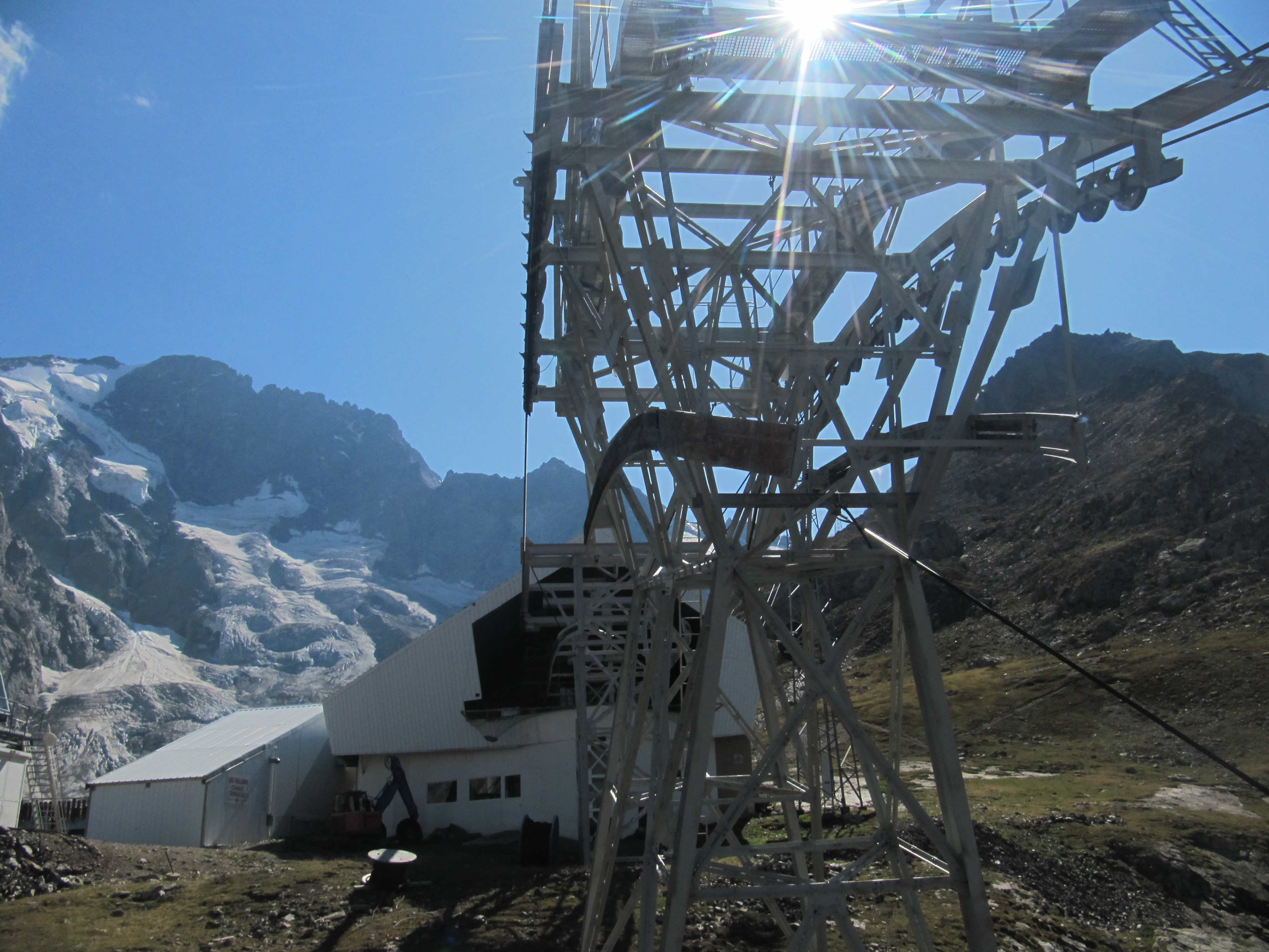 L'arrivée en gare amont du premier tronçon du 2S Pulsé de la Grave